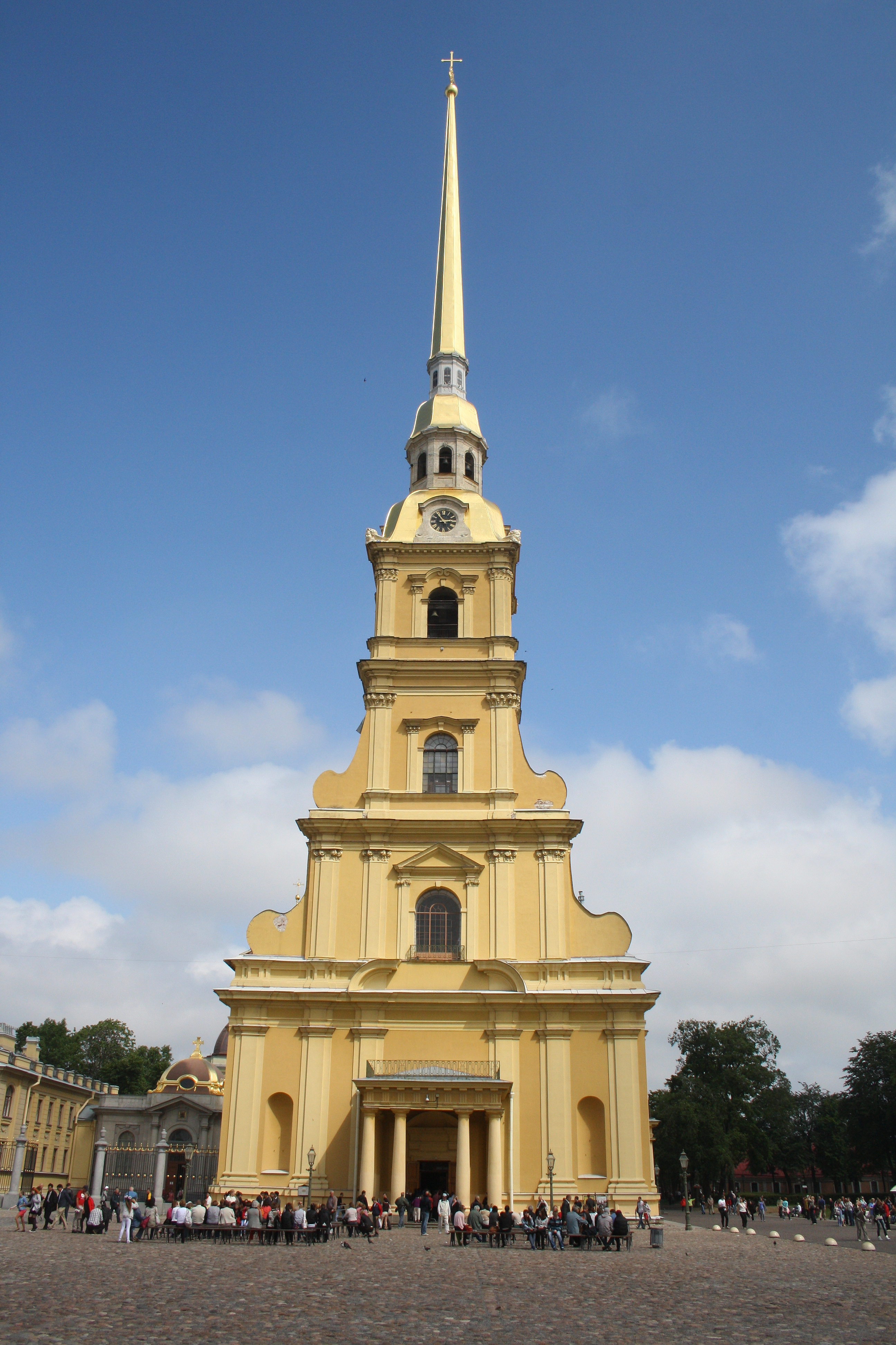 Петропа́вловский собо́р (официальное название — Собор во имя первоверховных апостолов Петра и Павла) — православный собор в Санкт-Петербурге в Петропавловской крепости, усыпальница русских императоров, памятник архитектуры петровского барокко. До 2012 года собор высотой 122,5 м. был самым высоким из зданий Санкт-Петербурга. С 2013 года он является третьим по высоте зданием в городе, после 140-метрового небоскрёба Лидер Тауэр[1] и 124-метрового ЖК «Князь Александр Невский» Санкт-Петербург. Заячий остров.Петропавловская крепость.